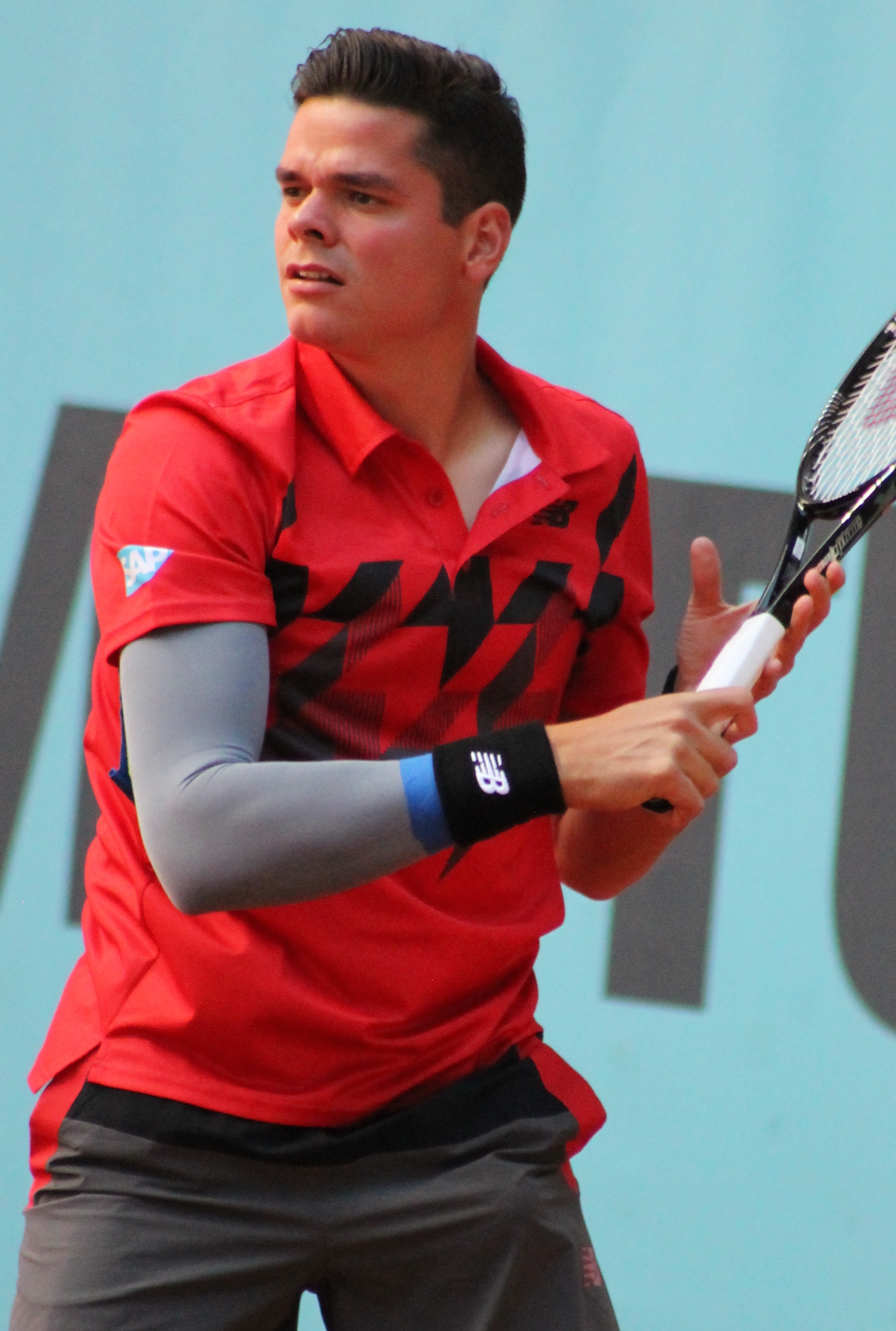 Raonic MA14 (7)